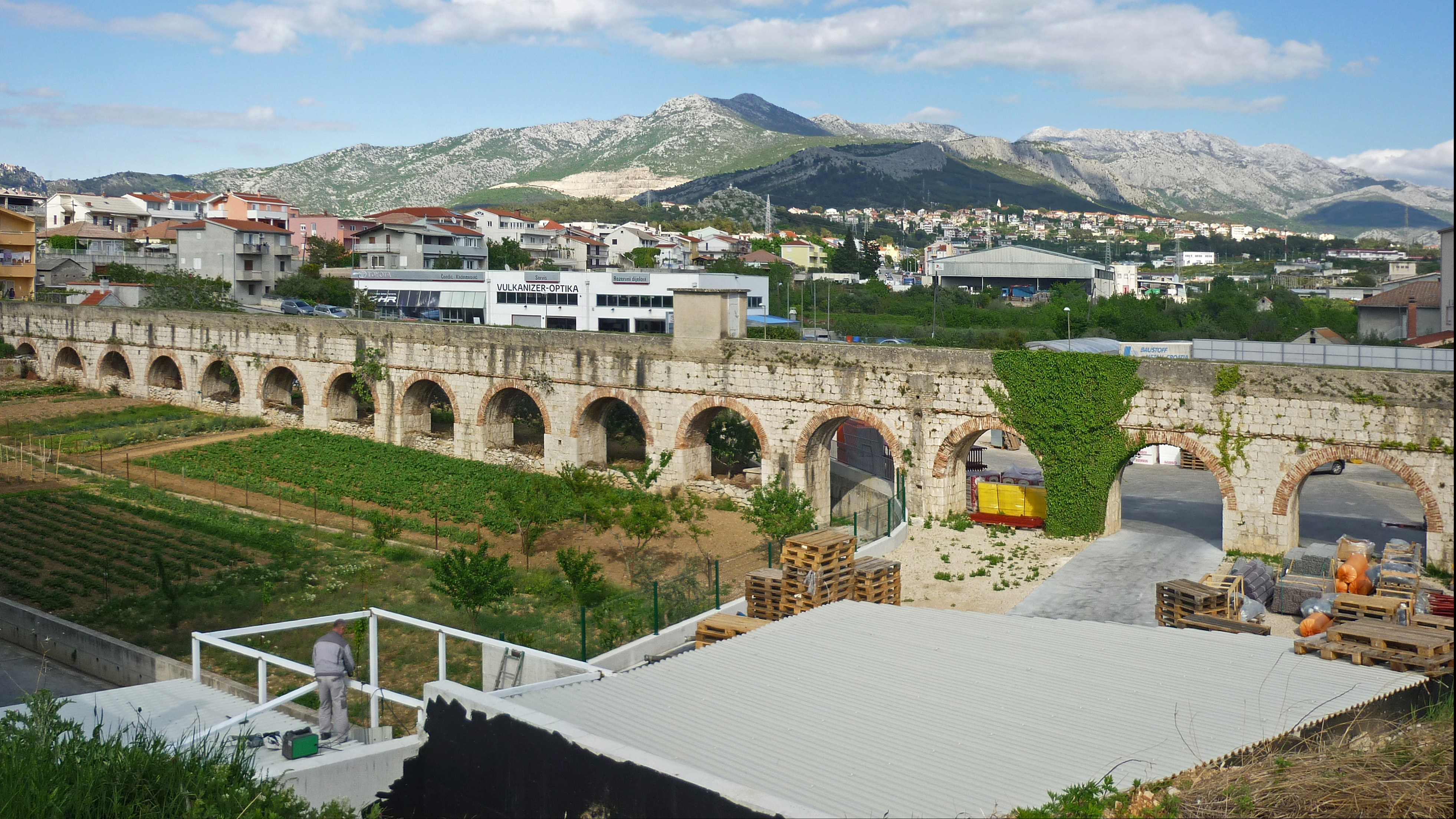 Diokletian-Aquädukt in Split (errichtet um 300)